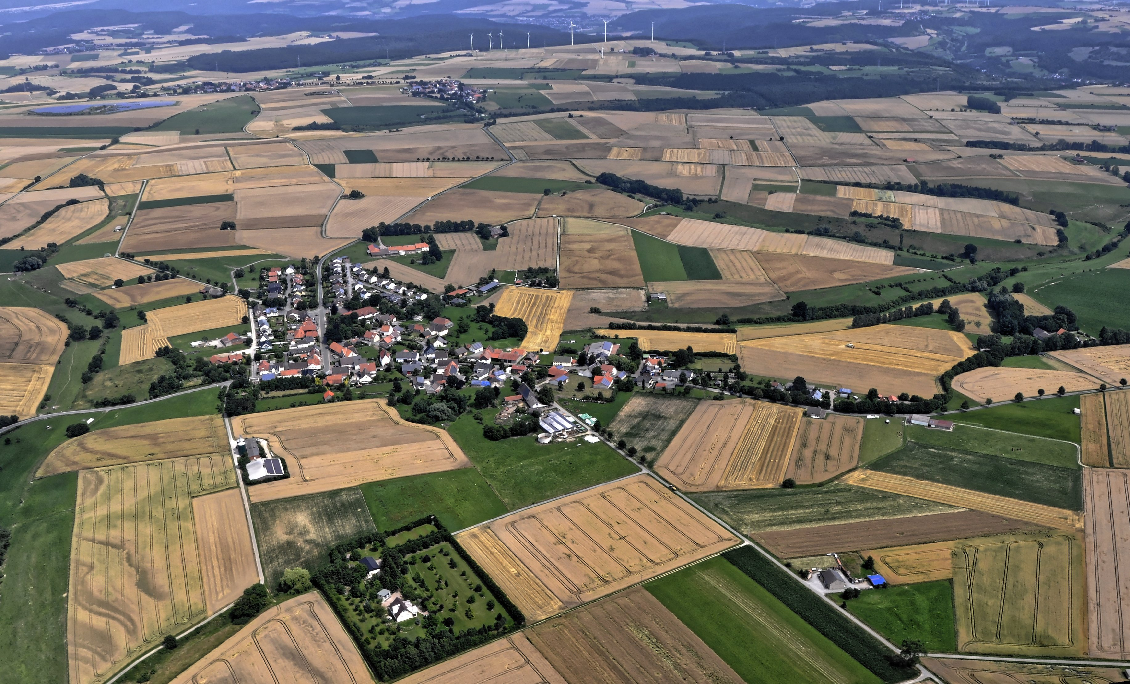 Bilder vom Flug Nordholz-Hammelburg 2015: Borgentreich-Natingen